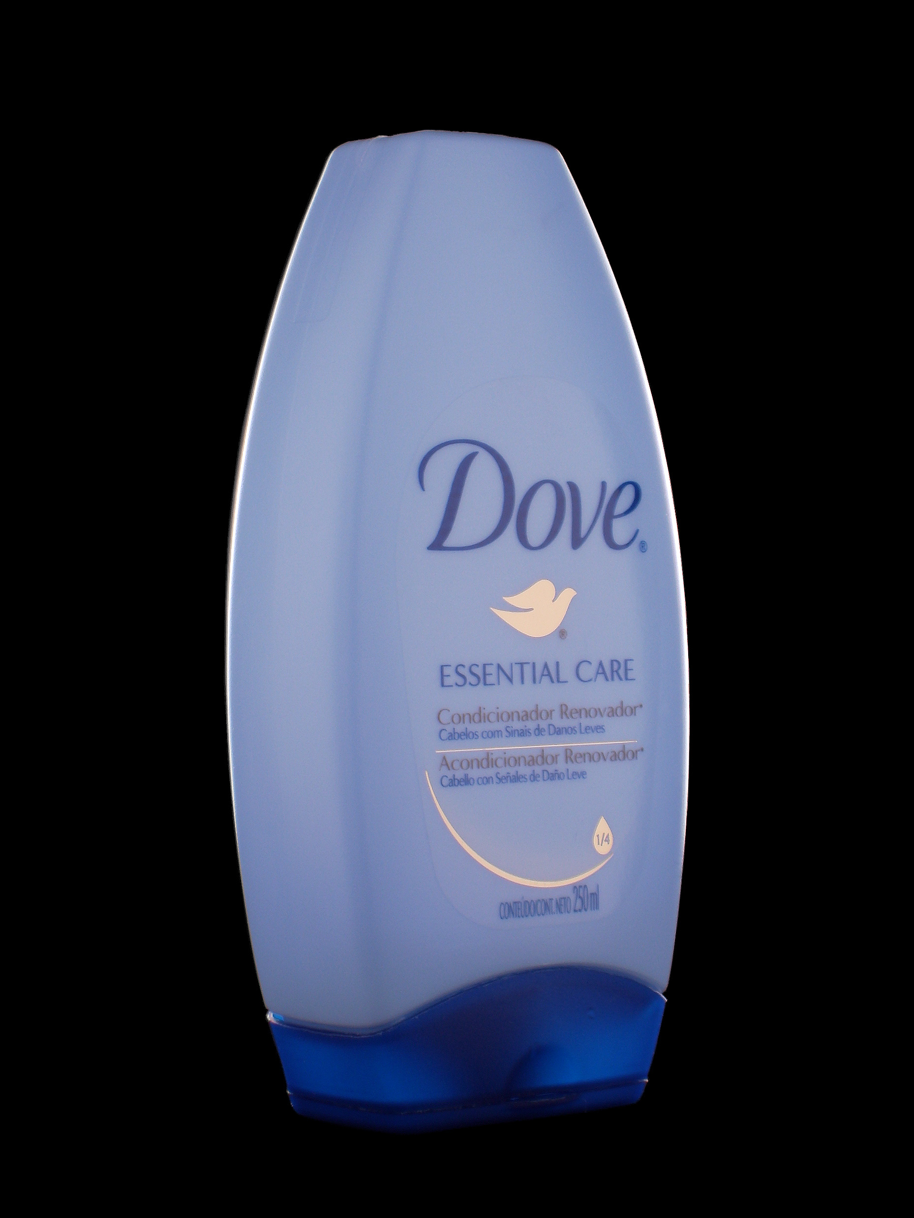 Botella de acondicionador para el cabello Dove Essential Care, fabricado en Brasil por Unilever.